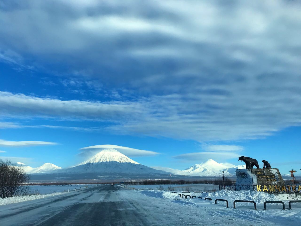 Зима на Камчатке. Скульптурная композиция "Медведи"